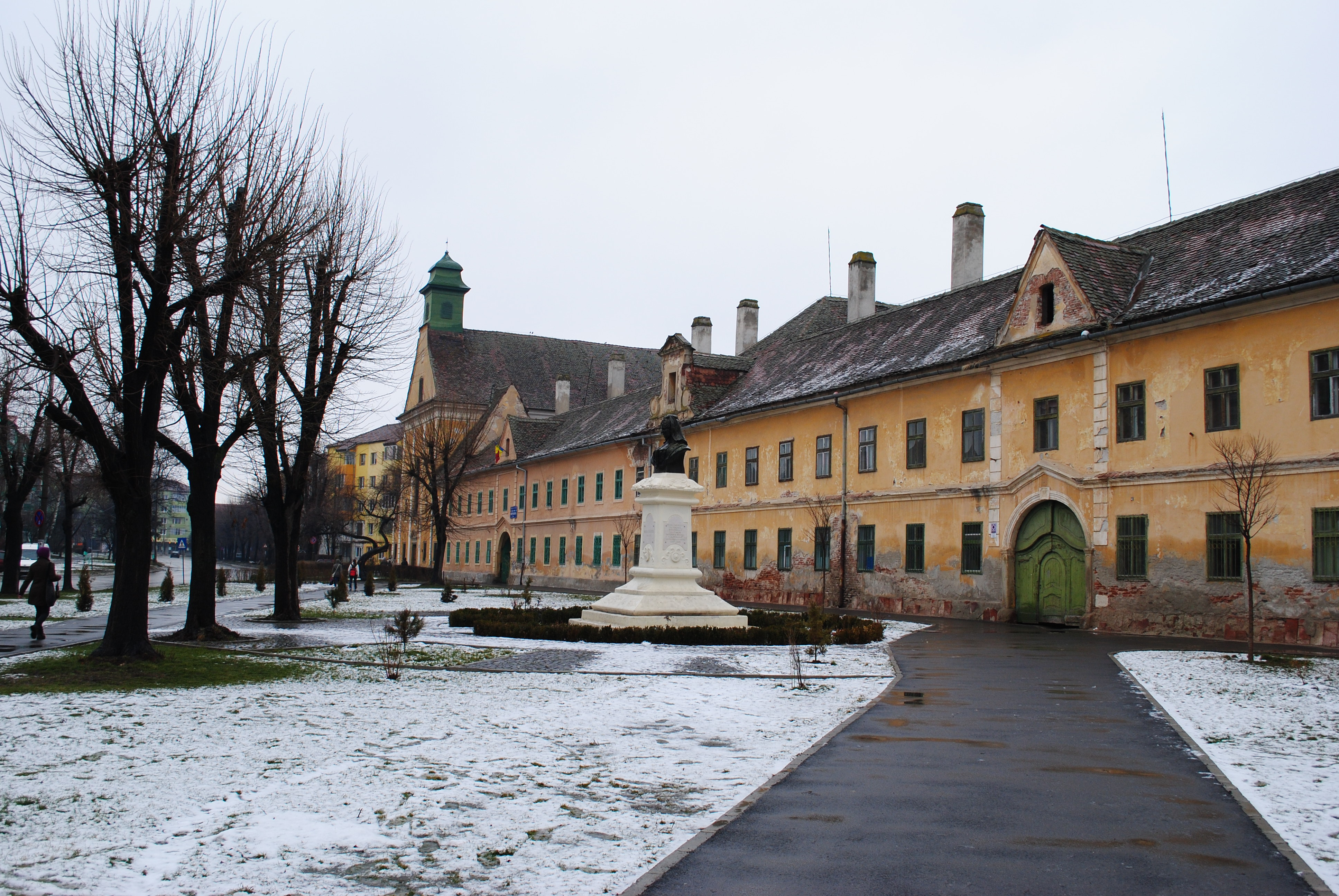 Ansamblul orfelinatului Terezian, 1750 - 1800